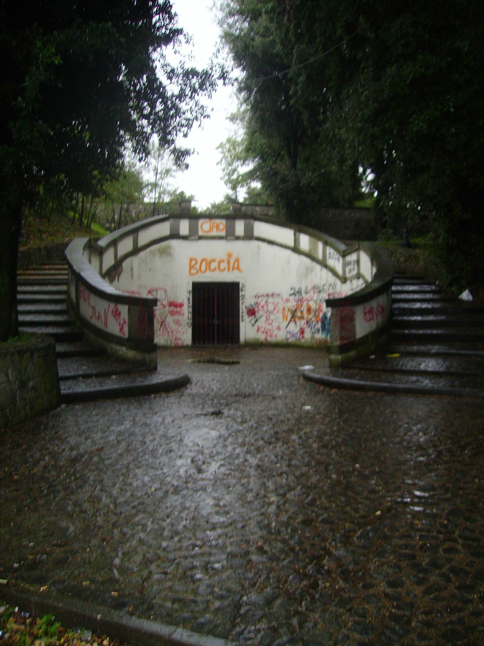 Ninfeo di Villa Desideri a Marino